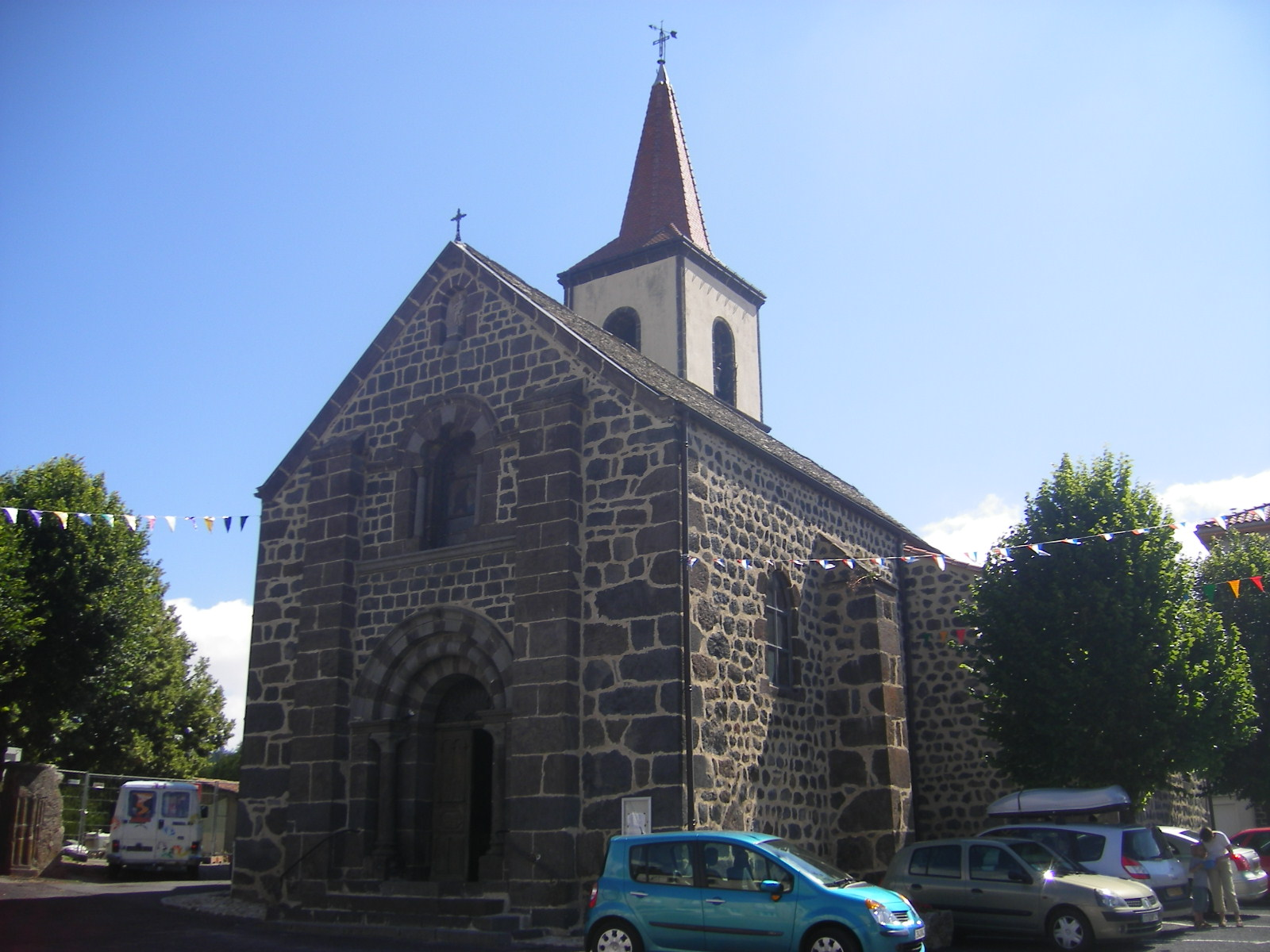 Costaros